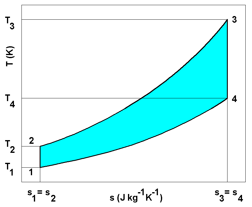 Idealizált Otto-ciklus a T-s diagramban